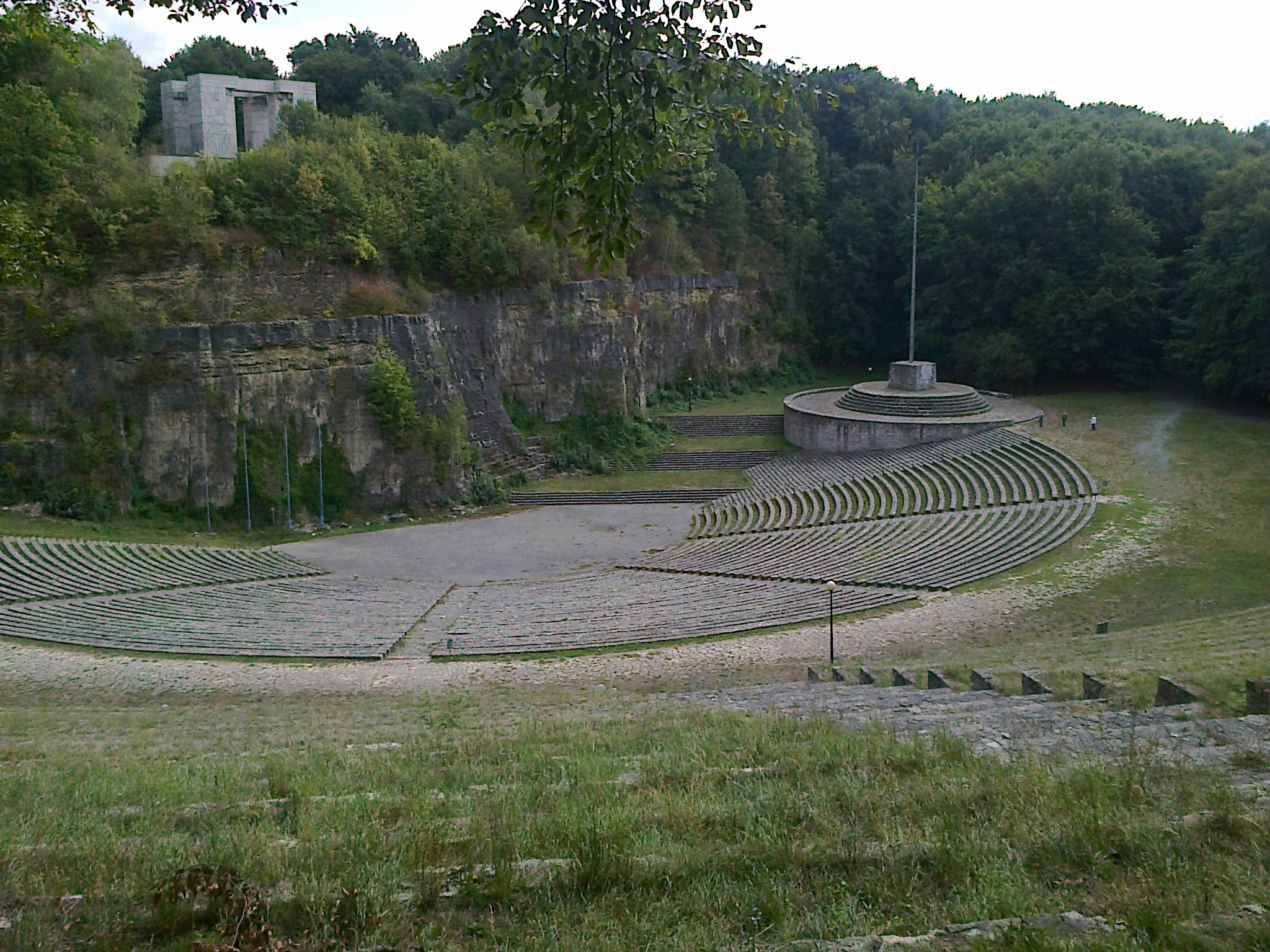 Góra Św. Anny